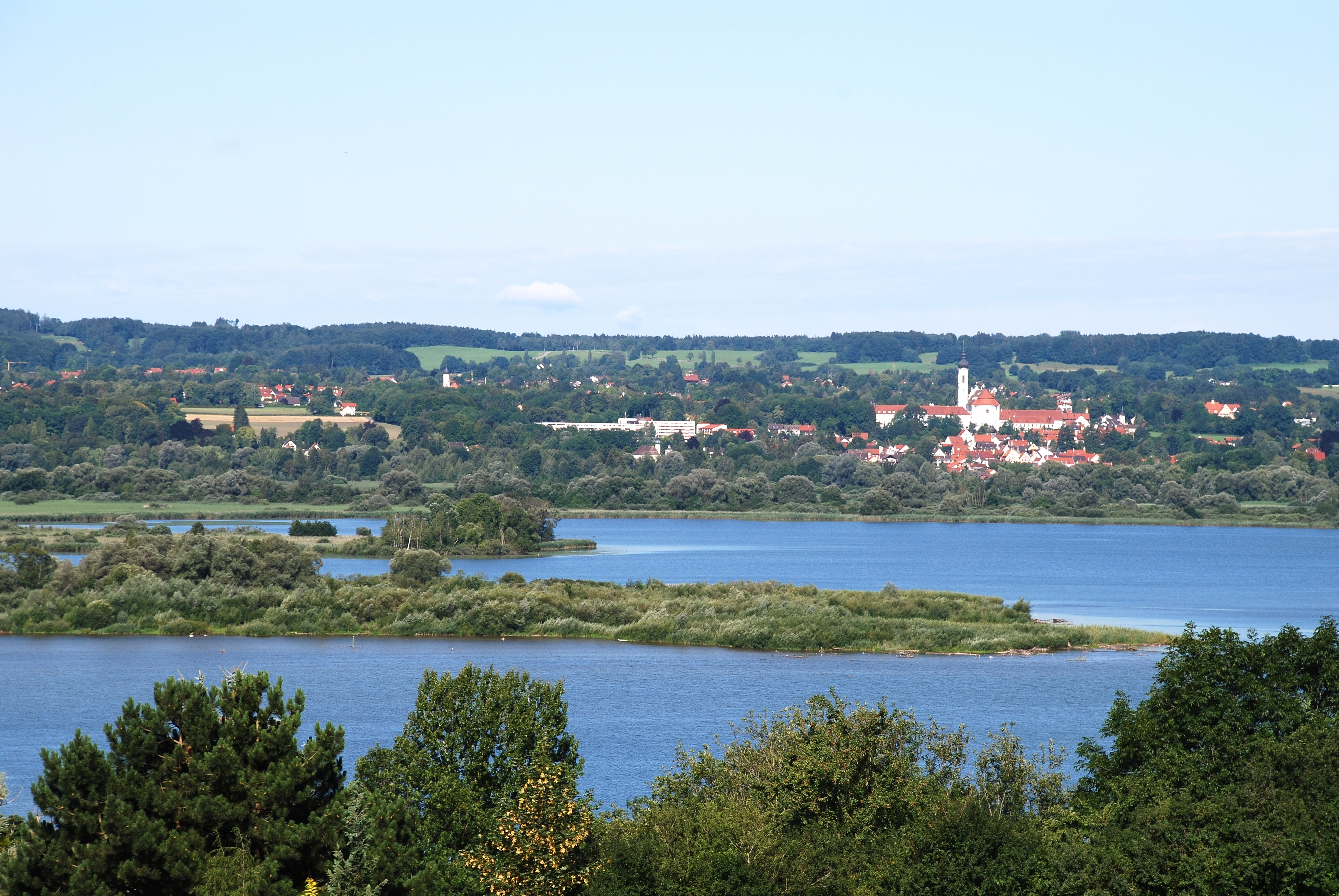 Vogelschutzgebiet vor der Gemeinde Dießen am südlichen Ende des Ammersees.